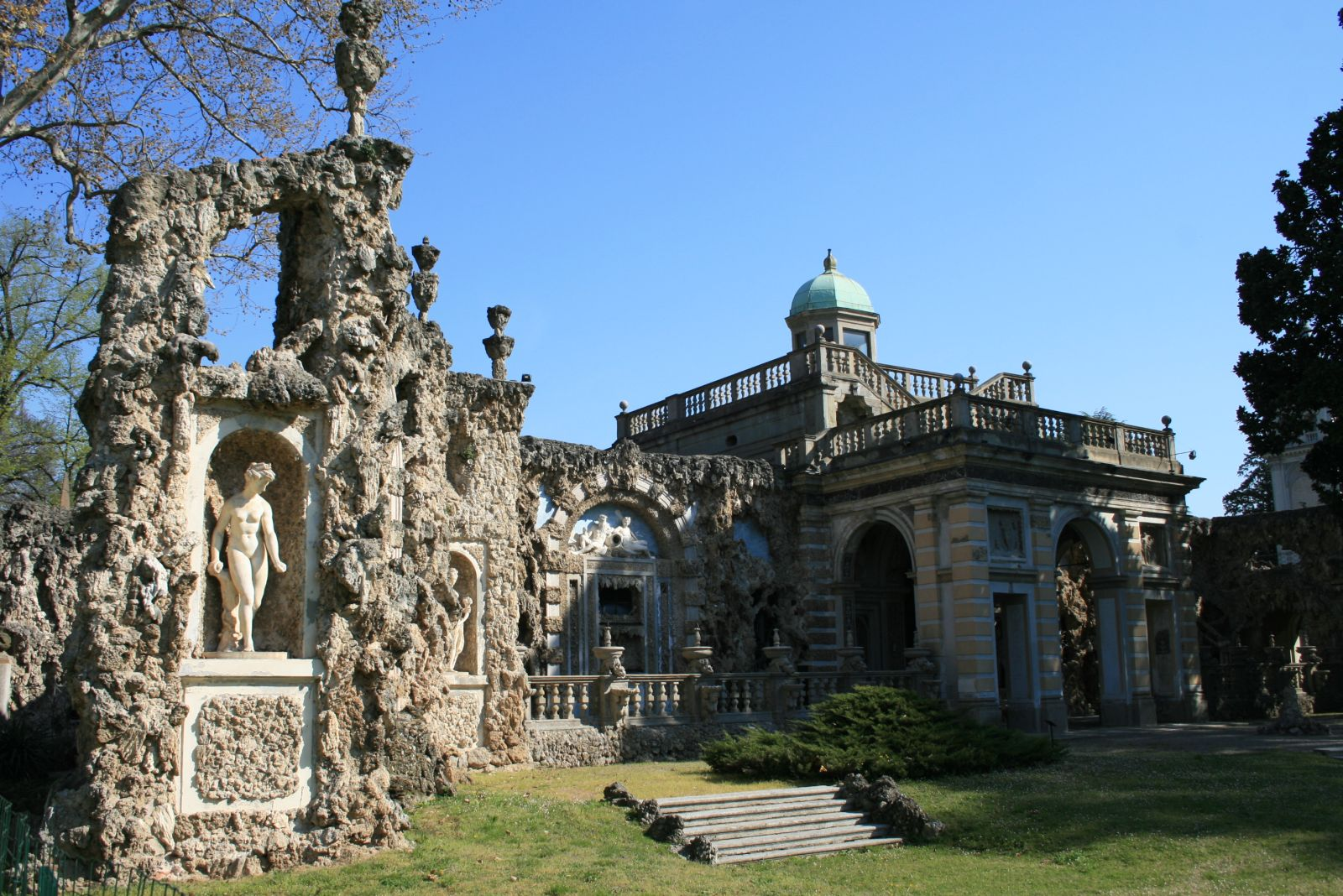 Lainate Nymphaeum